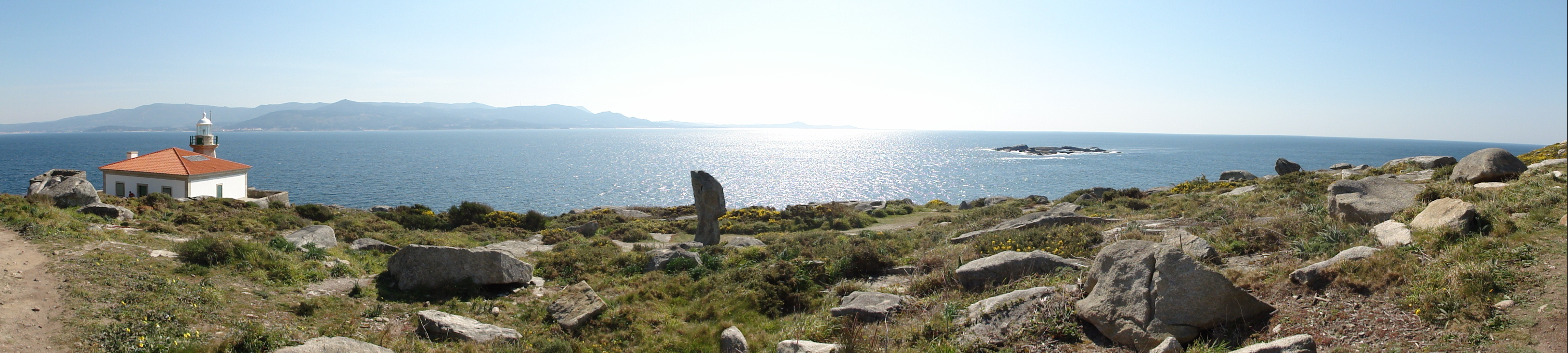 Camino hacia el Monte Louro This is a photography of a Site of Community Importance in Spain with the ID: ES1110012. Natura2000 entry, EEA entry